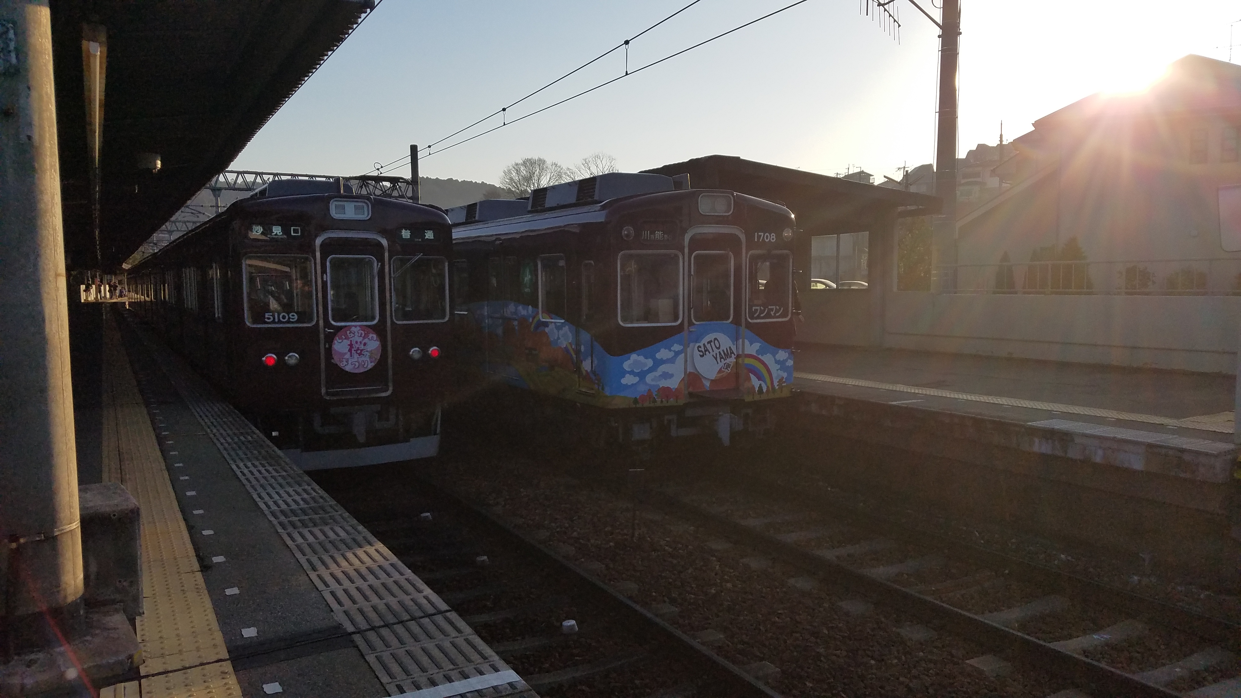 能勢電1700系の里山便です。